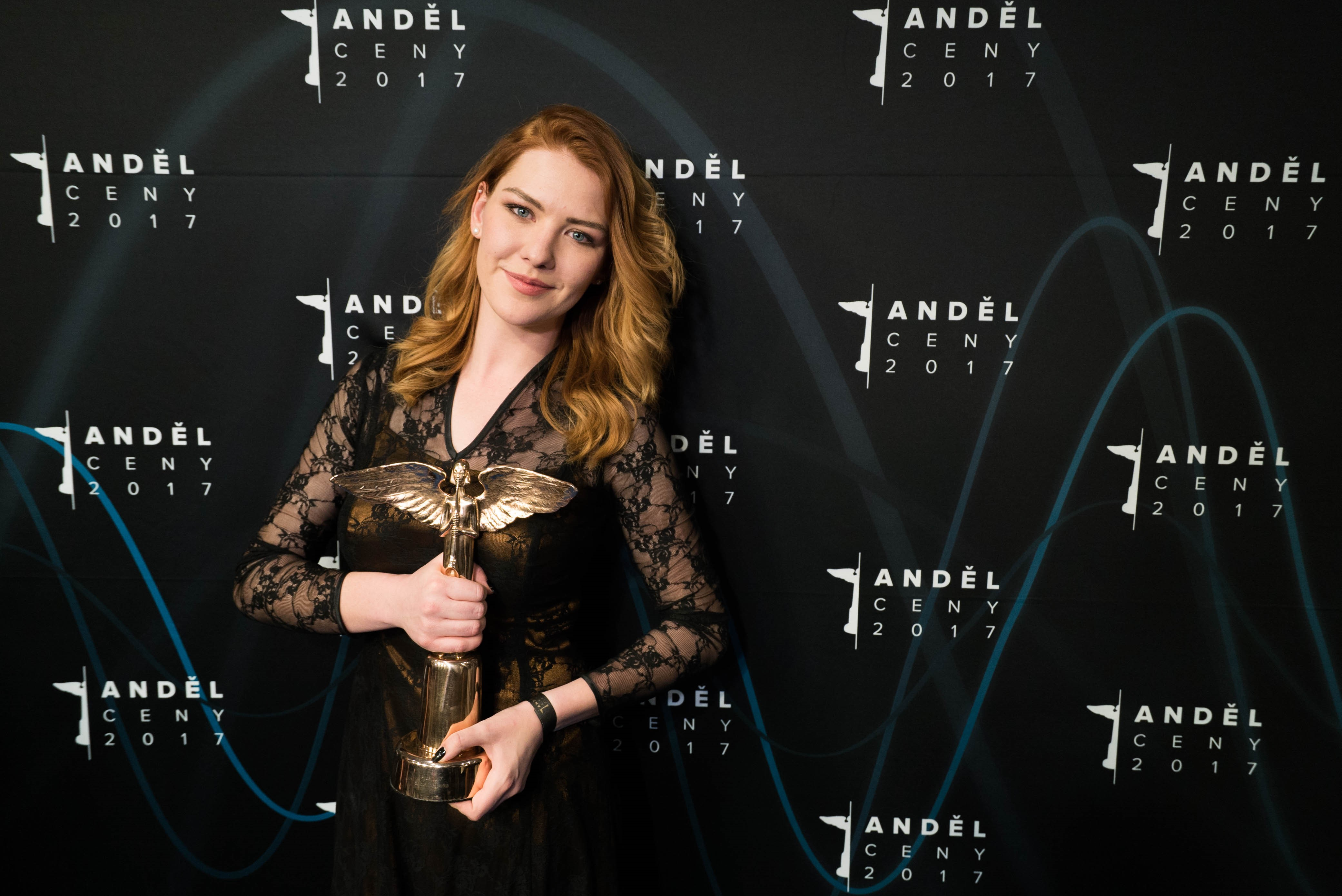 Debbi se soškou Anděl v kategorii Sólová interpretka roku 2017.